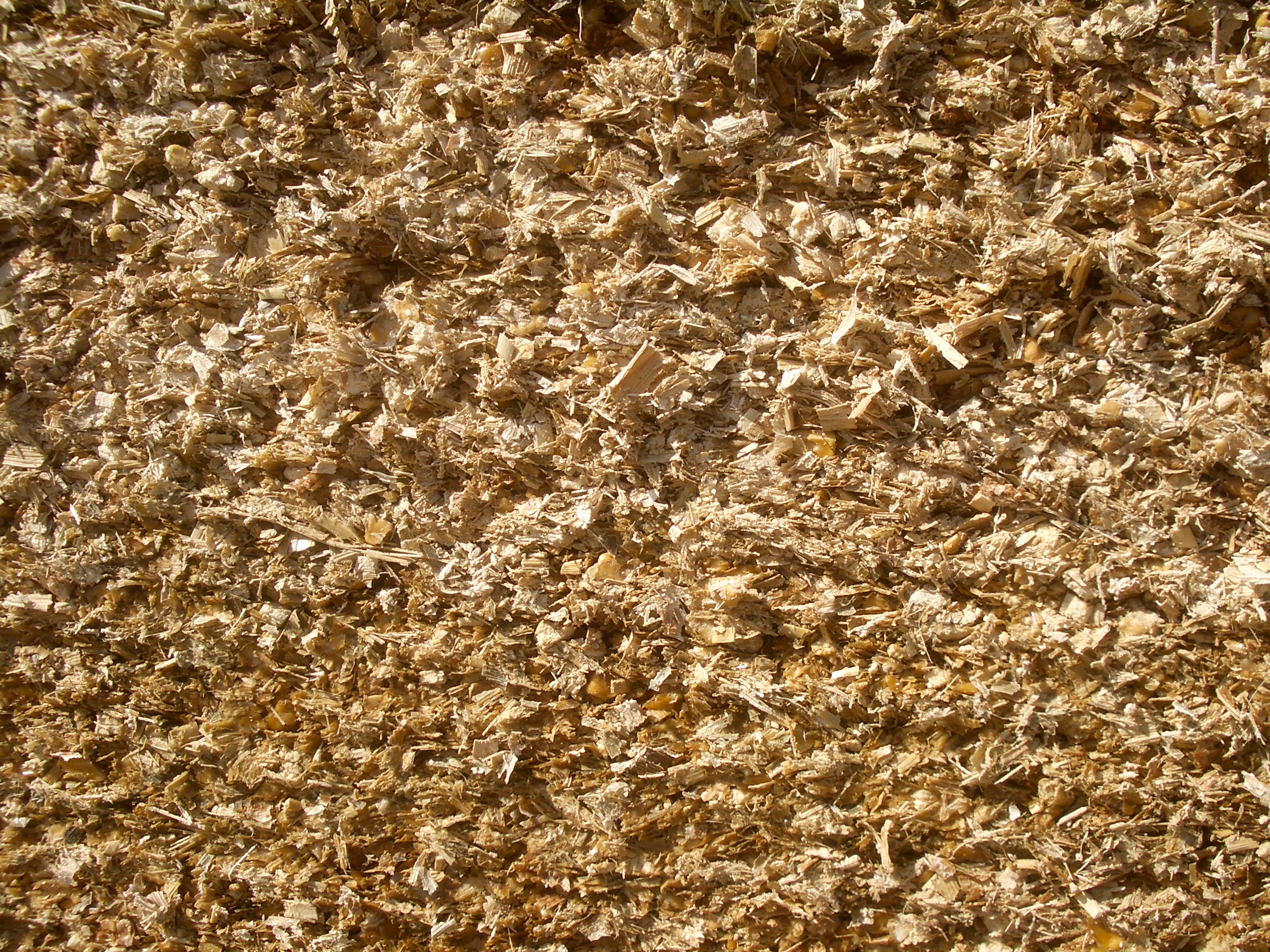 Maissilage (kompakte und ausgetrocknete Anschnittfläche eines Fahrsilos) auf einem Hof in Zeilitzheim, Bayern, Deutschland